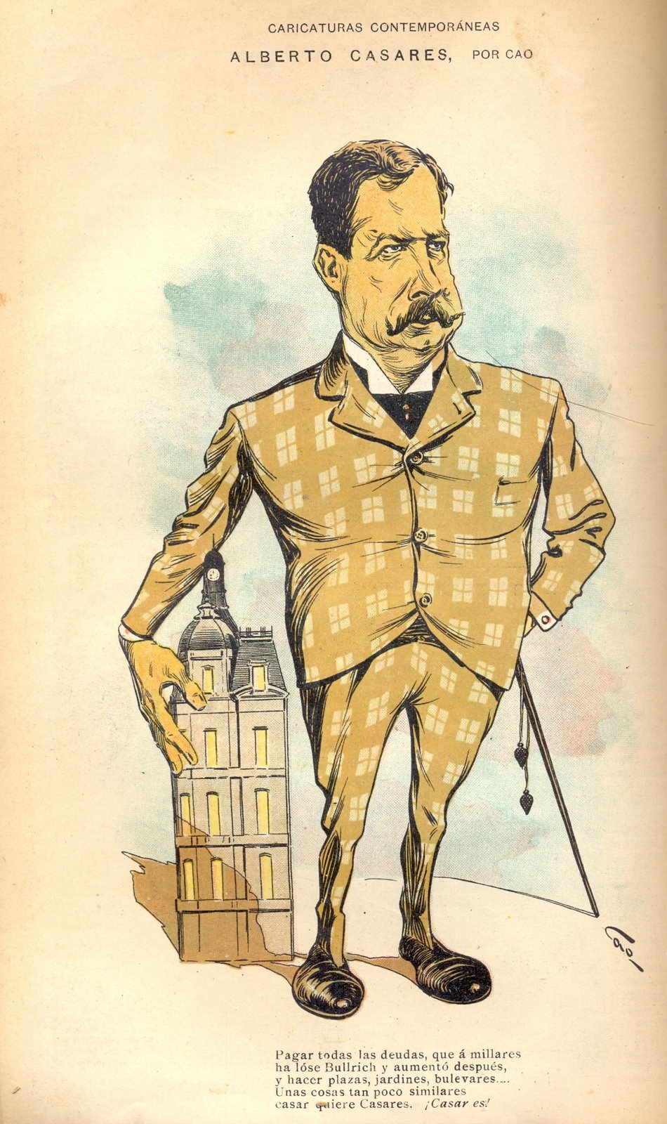 Caricatura del int. de Bs. As. Alberto Casares.